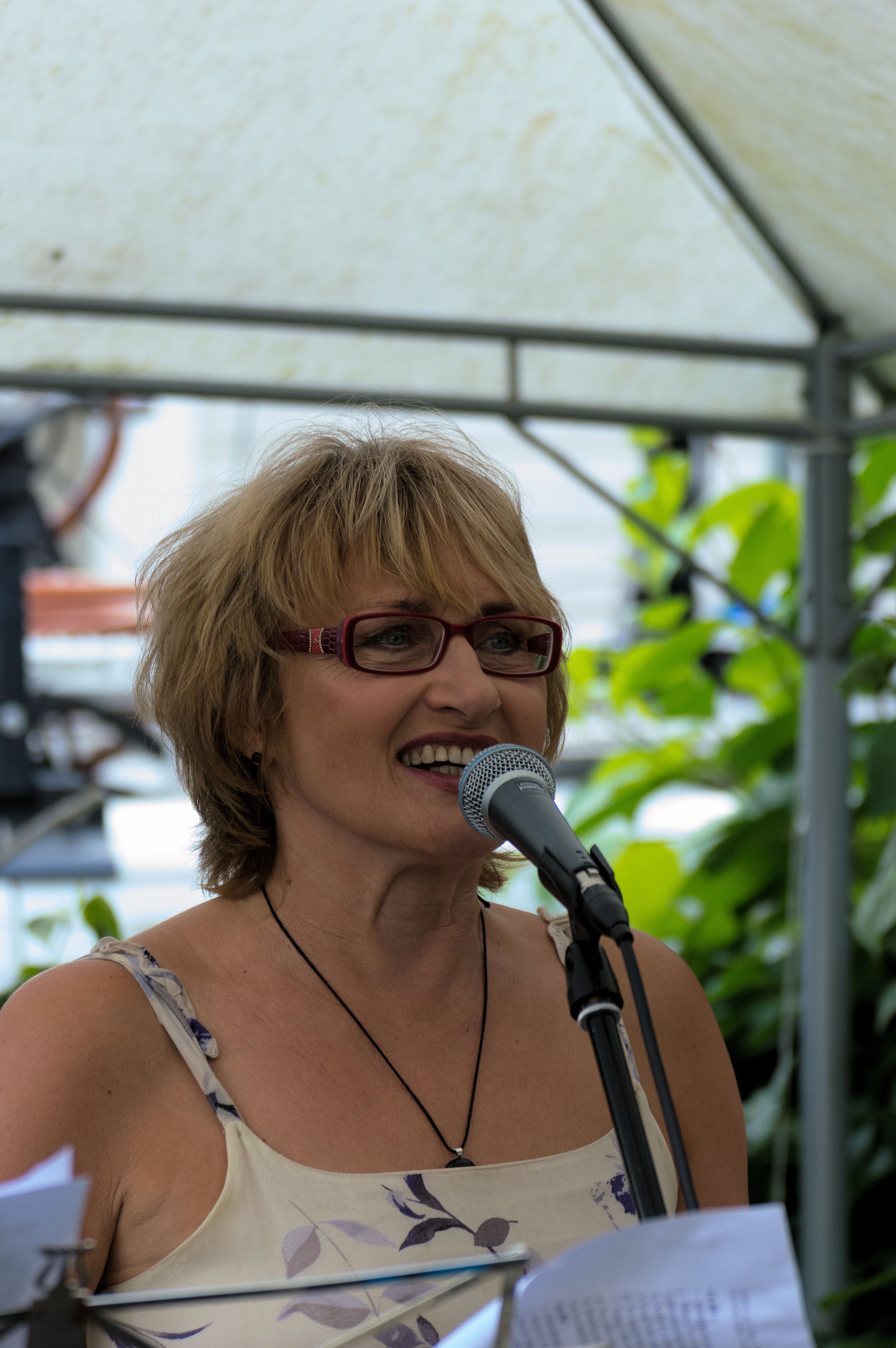 Ami Aspelund suomalainen laulaja